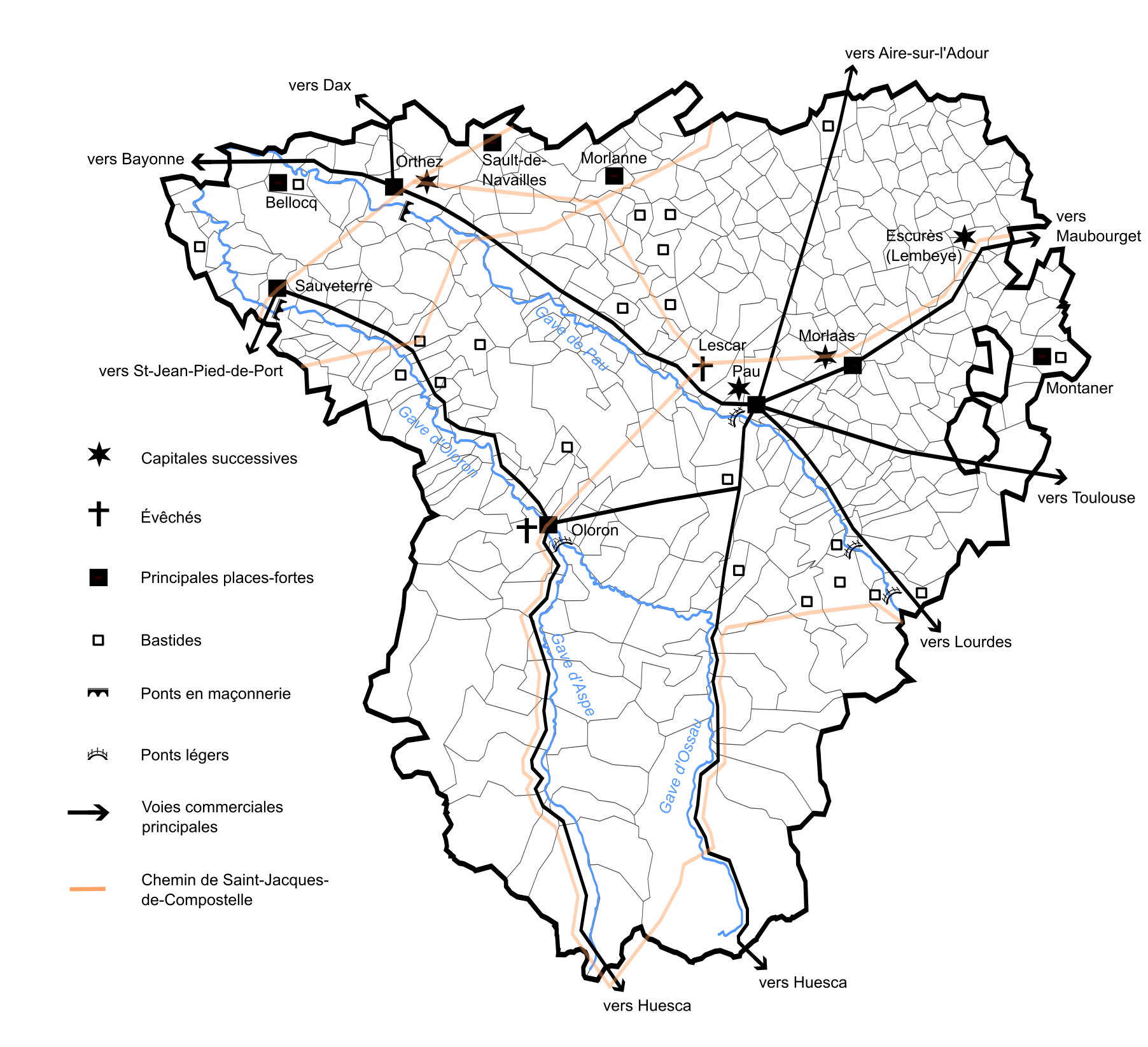 Carte du Béarn au Moyen Âge.